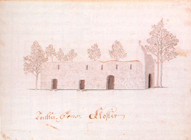 Kloster Tautra, Ansicht von Norden im Jahr 1774